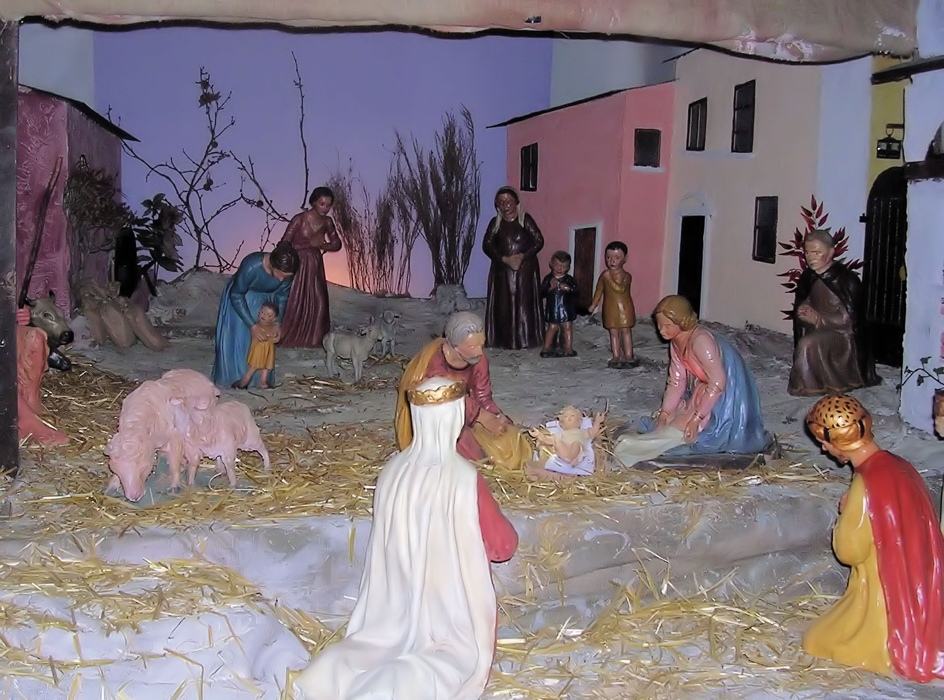 Nativity scene in bolognese style, San Giacomo Maggiore Church, via Zamboni in Bologna